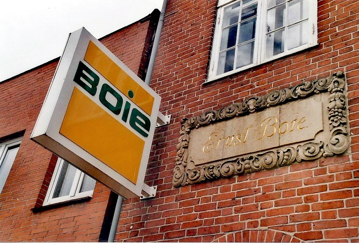 Firma einst und jetzt am Geschäftshaus der Boie